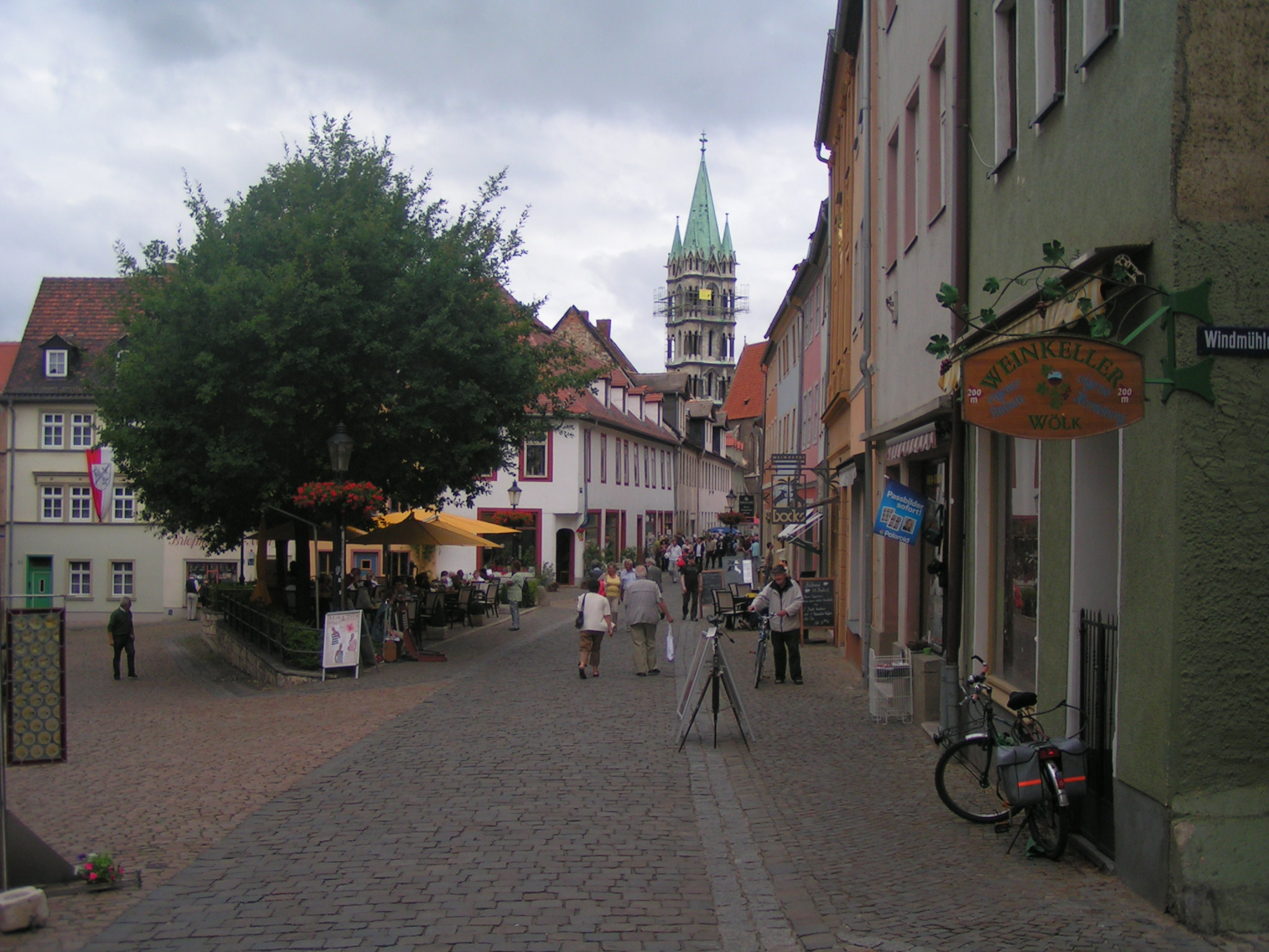 Altstadt von Naumburg